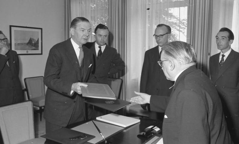 Austausch der Ratifikationsurkunden im Rahmen der deutsch-dänischen Wiedergutmachung